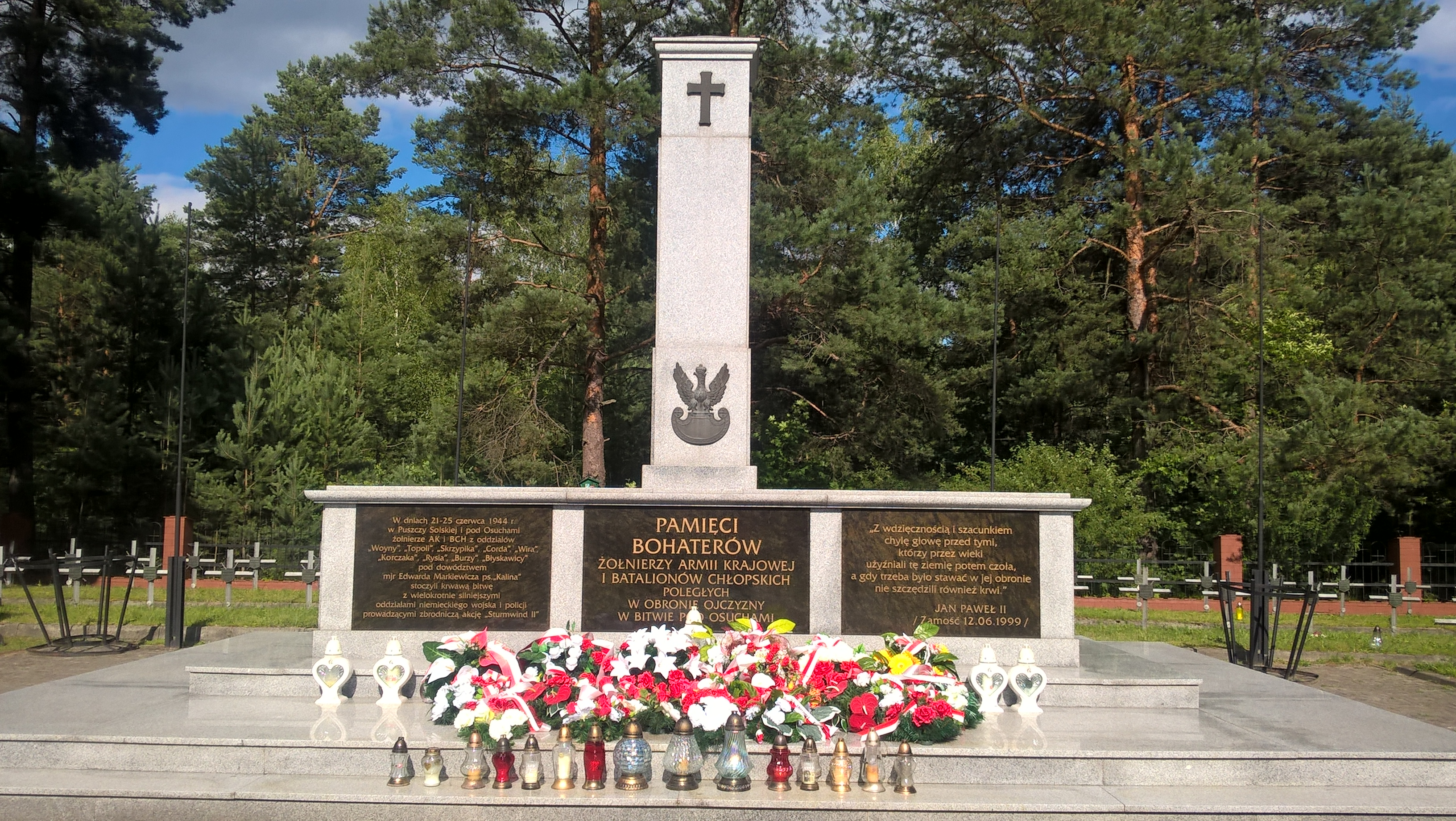 Cmentarz partyzancki w Osuchach